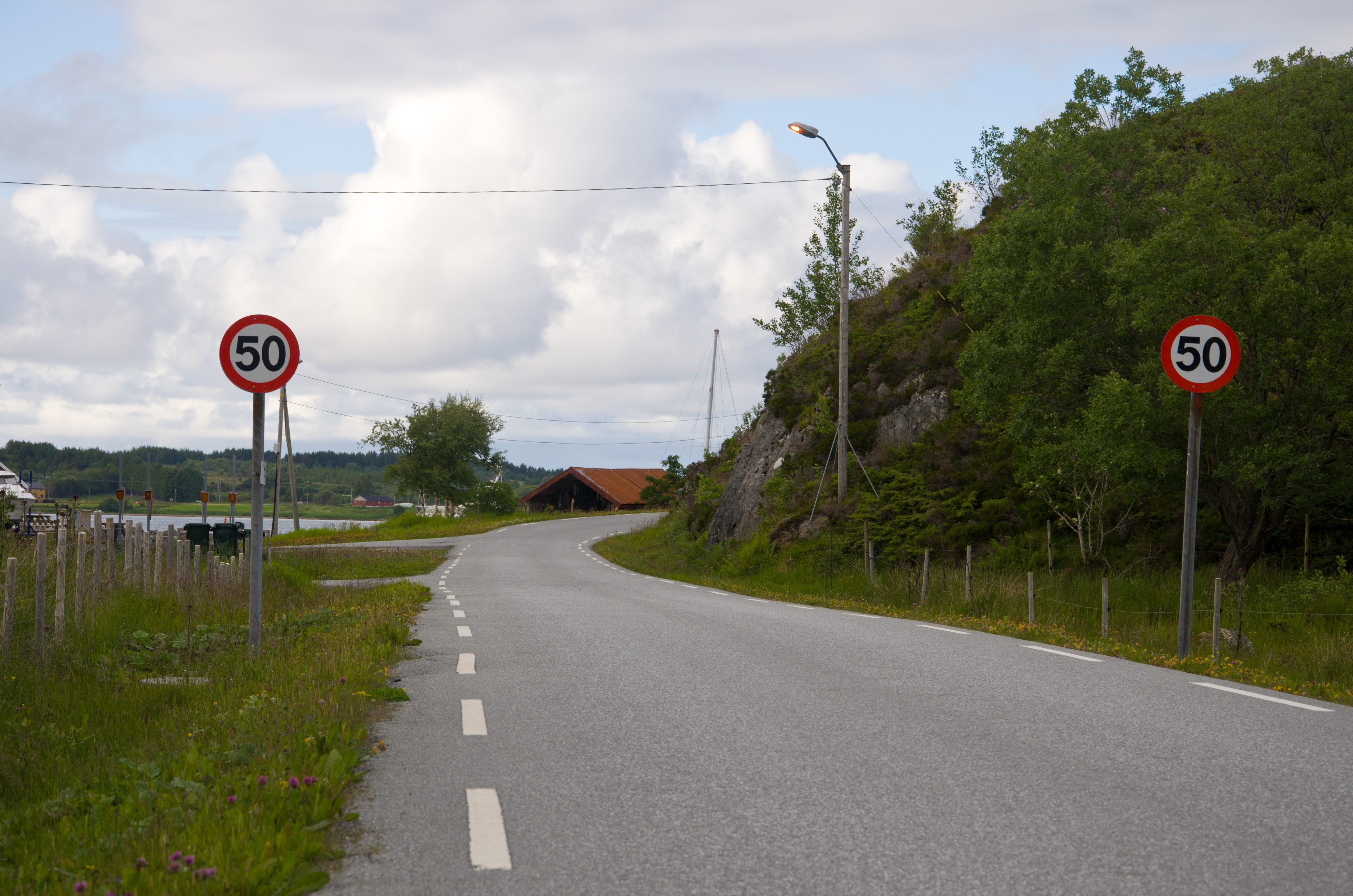 Møre og Romsdals fylkesvei 218 Røssøyvågvegen på Gossa, Aukra.